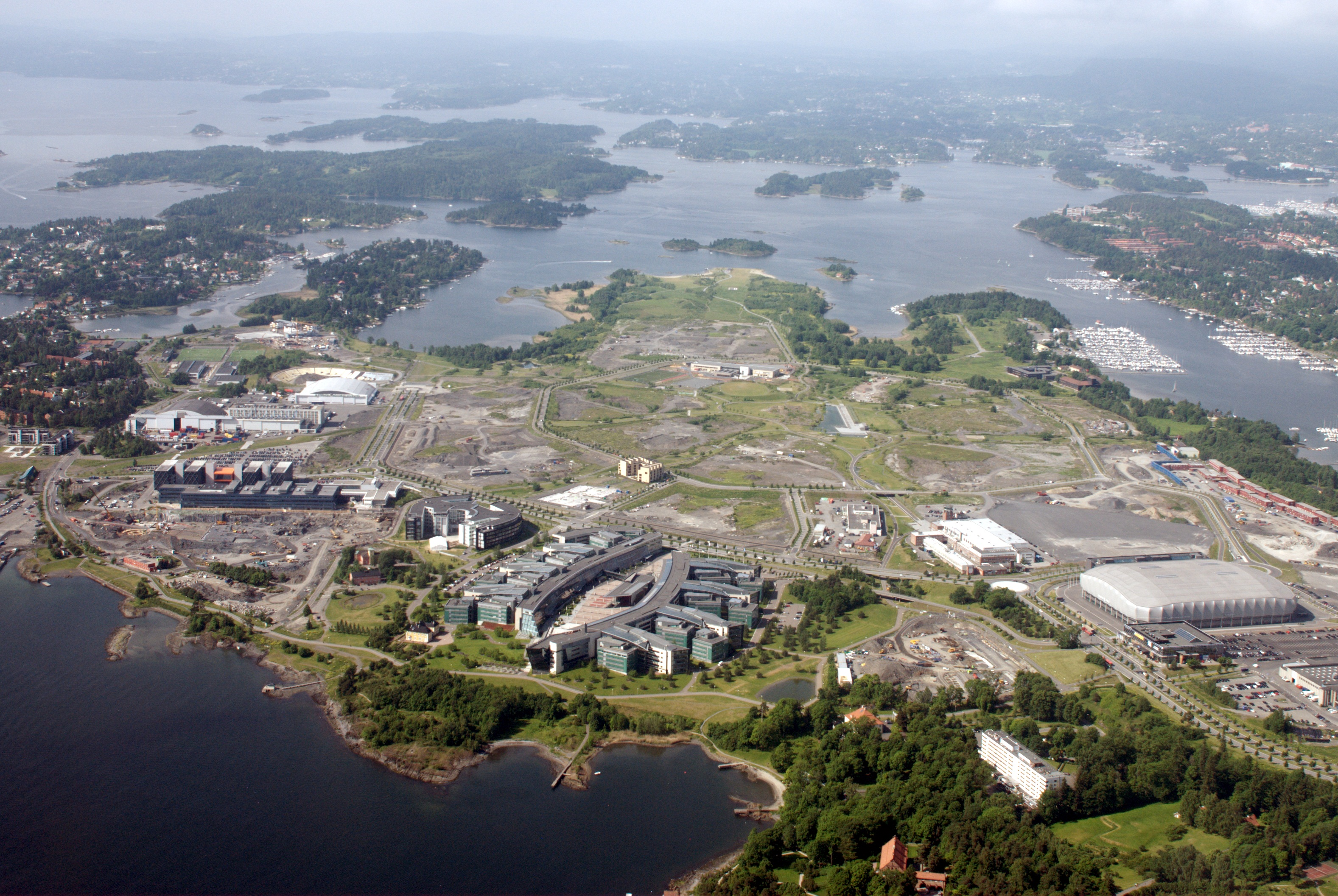 Fornebu